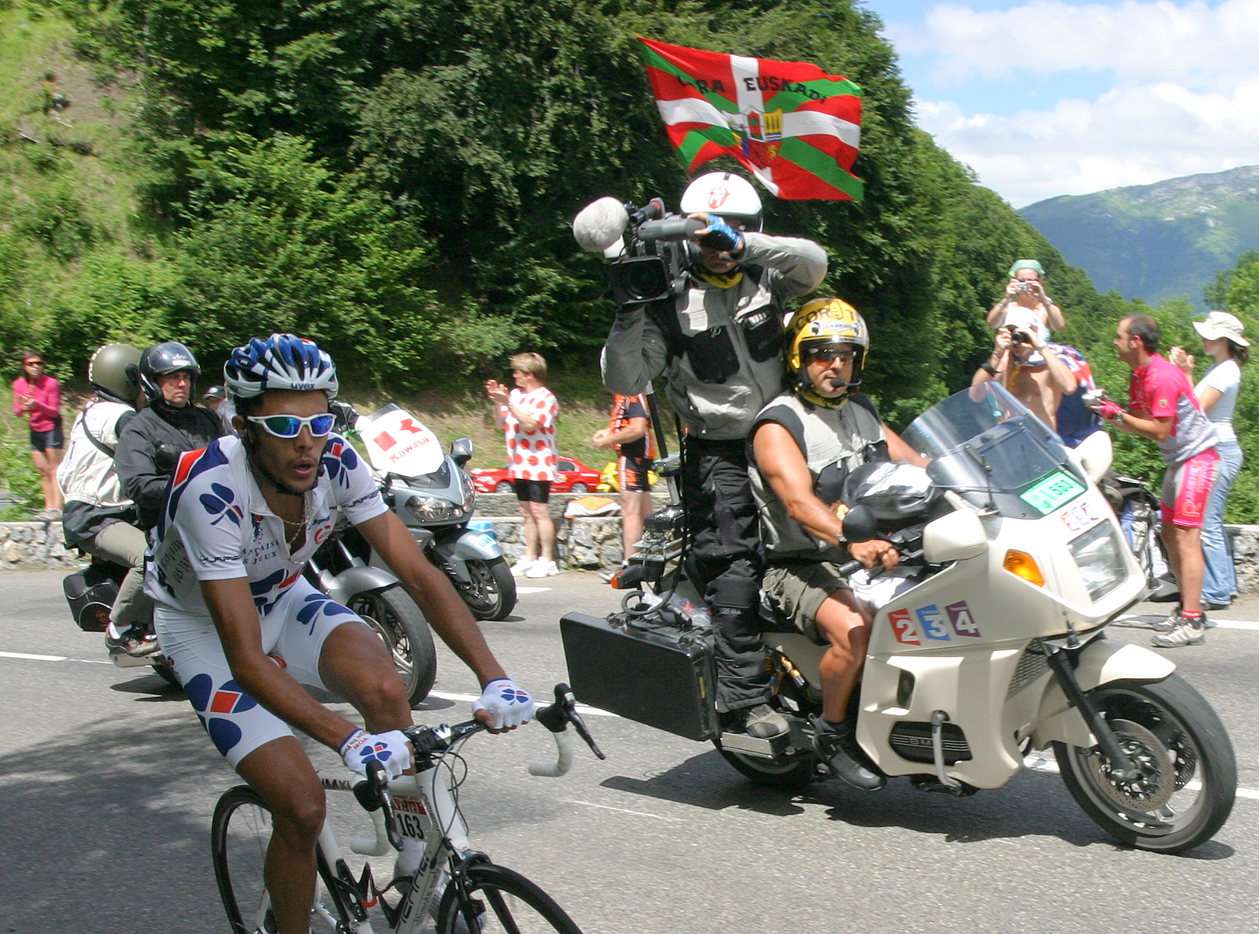 Photo de Rémy Di Grégorio dans le Tourmalet, 14 juillet 2008